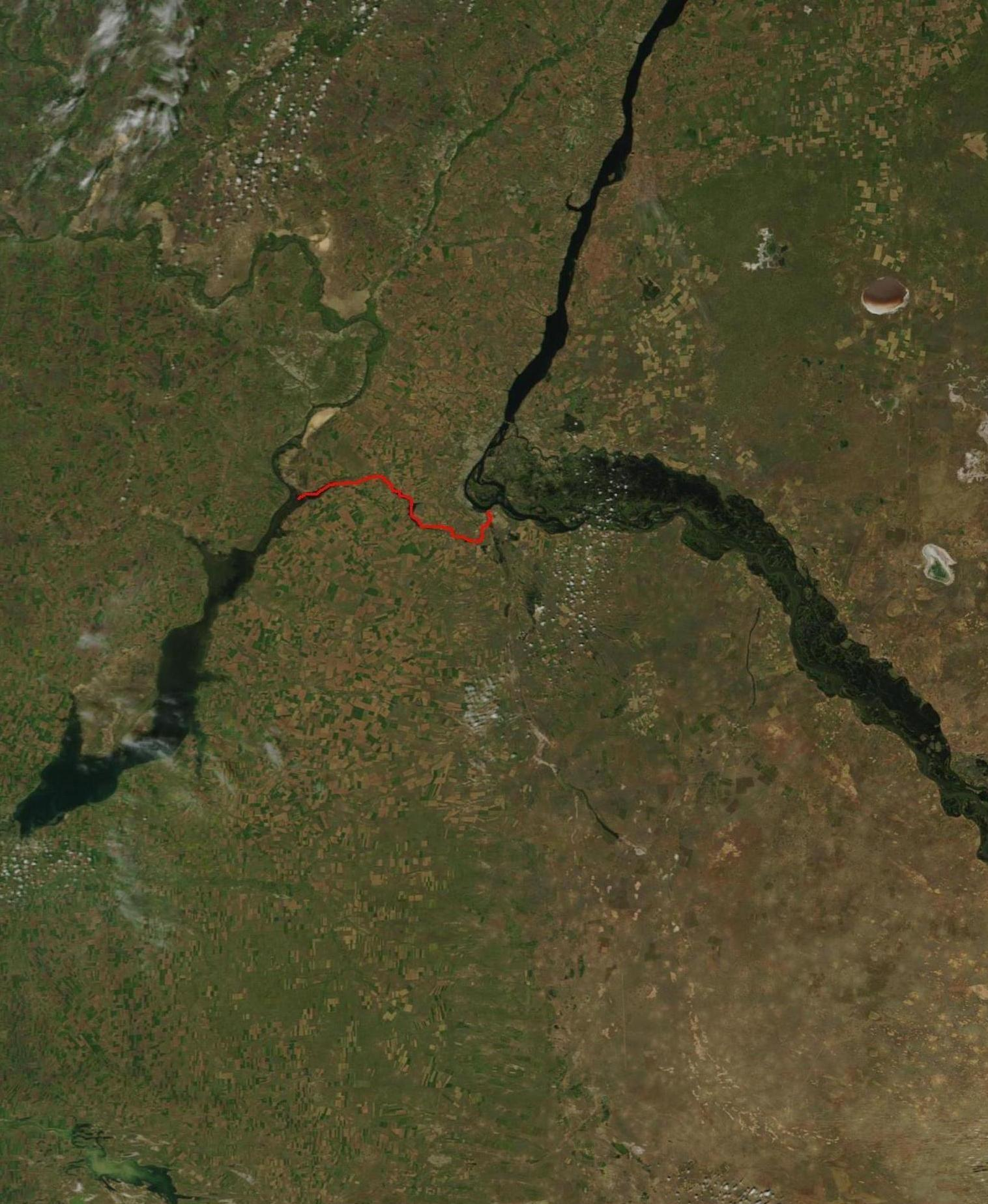 Снимок Волго-Донского канала